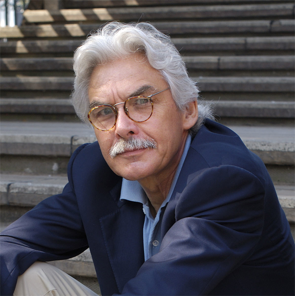 Arch. Francesco Gostoli